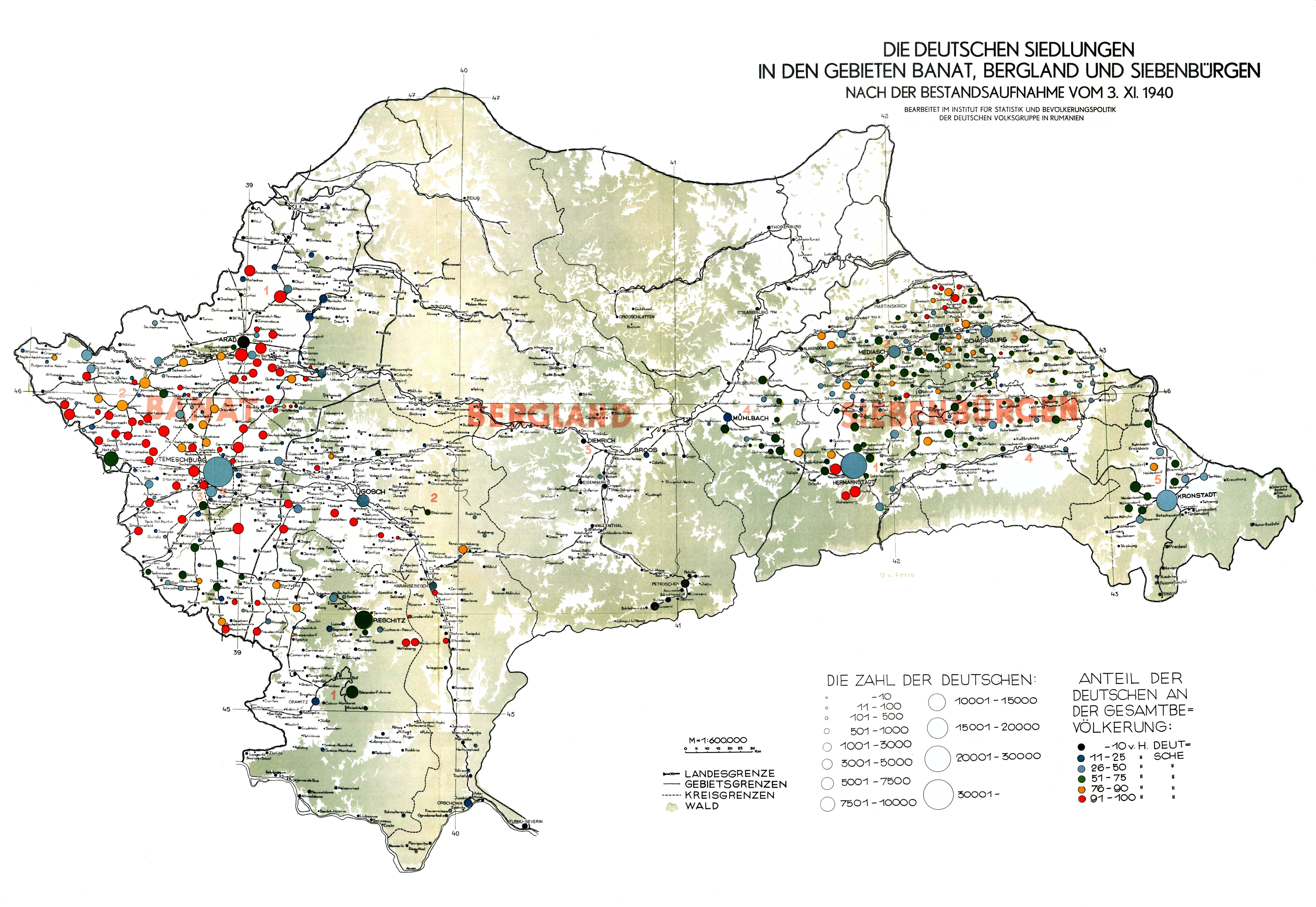 Die deutschen Siedlungen in Banat und in Südsiebenbürgen nach der Bestandsaufnahme vom 3.11.1940.